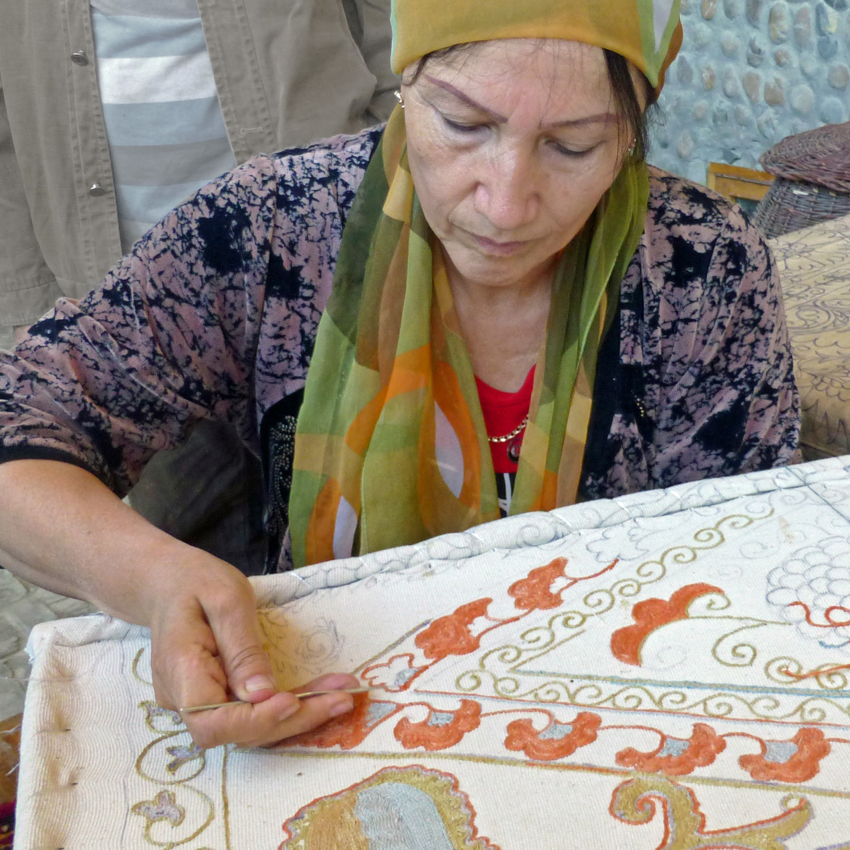 Atelier de broderie (suzani) à Guijdouvan (Ouzbékistan)